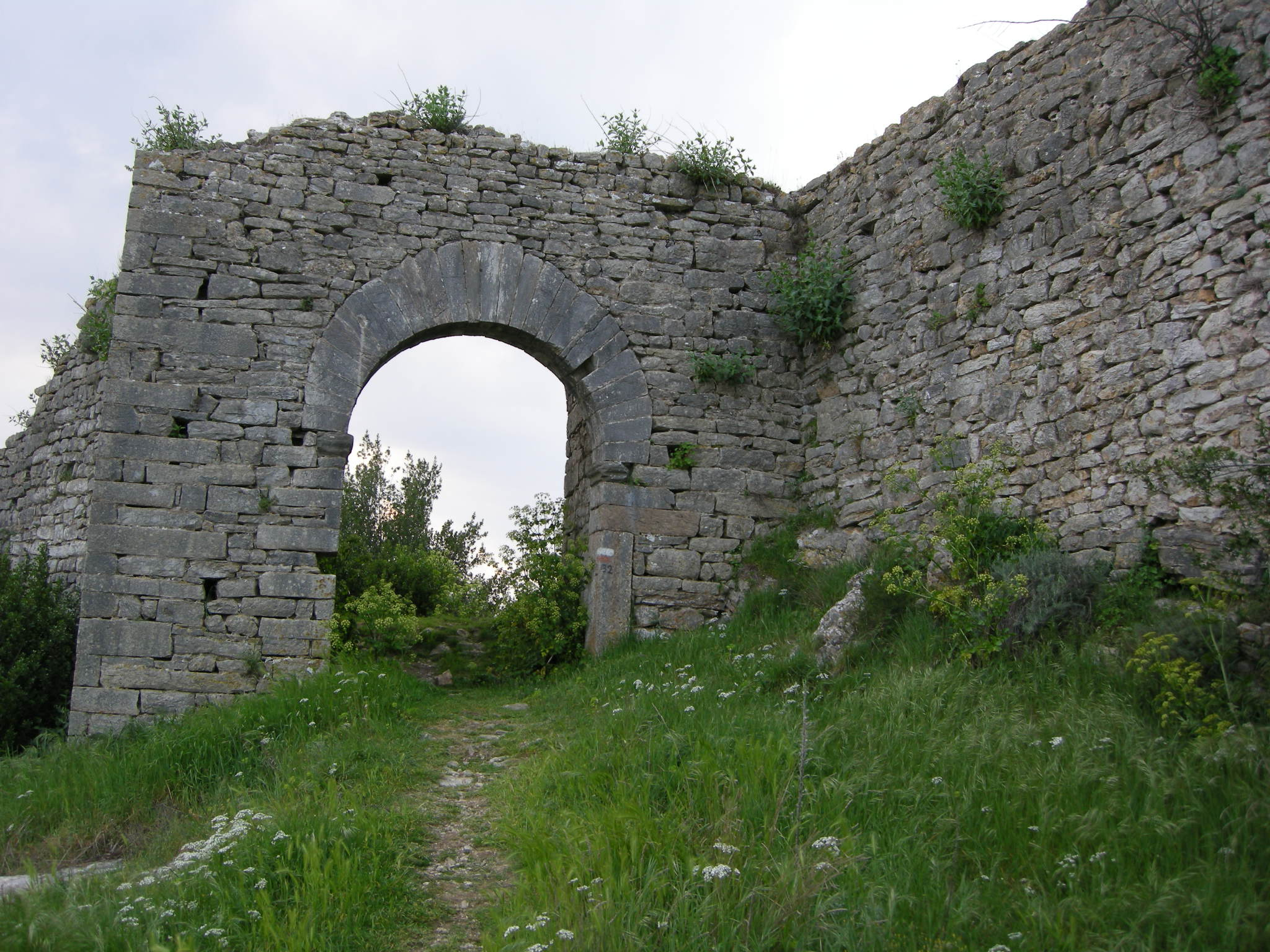 Castello di monsummano alto, arco est